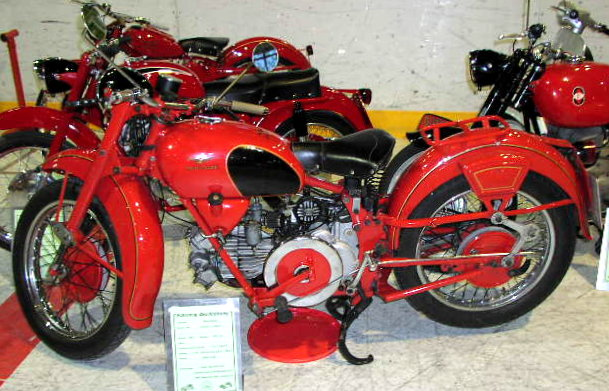 Bildbeschreibung: Moto Guzzi Falcone Turismo, Bj. 1962 Quelle: selbst fotografiert Fotograf/Zeichner: ... Datum: MartinHansV Sonstiges: ...